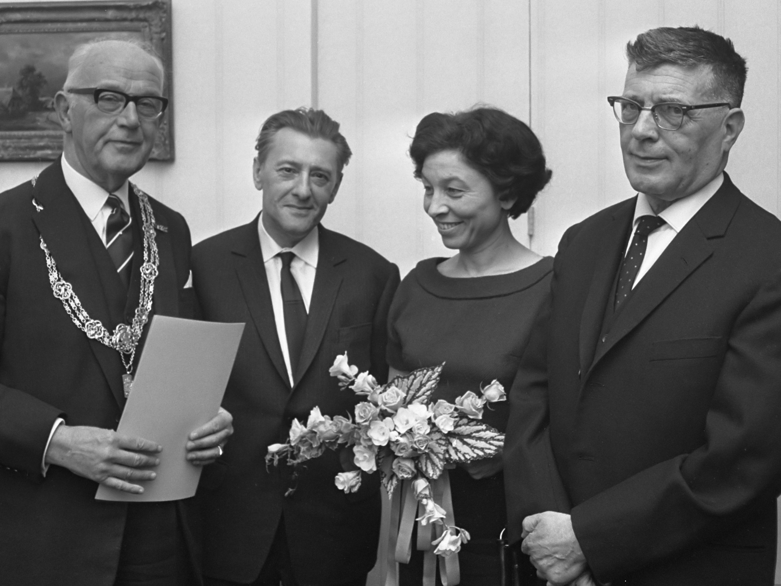 Prijsuitreiking Jan Campertstichting te Den Haag, v.l.n.r. Burgemeester Kolfschoten, Paul Boon, Hanny Michaelis en prof. dr. J. Presser 6 april 1967